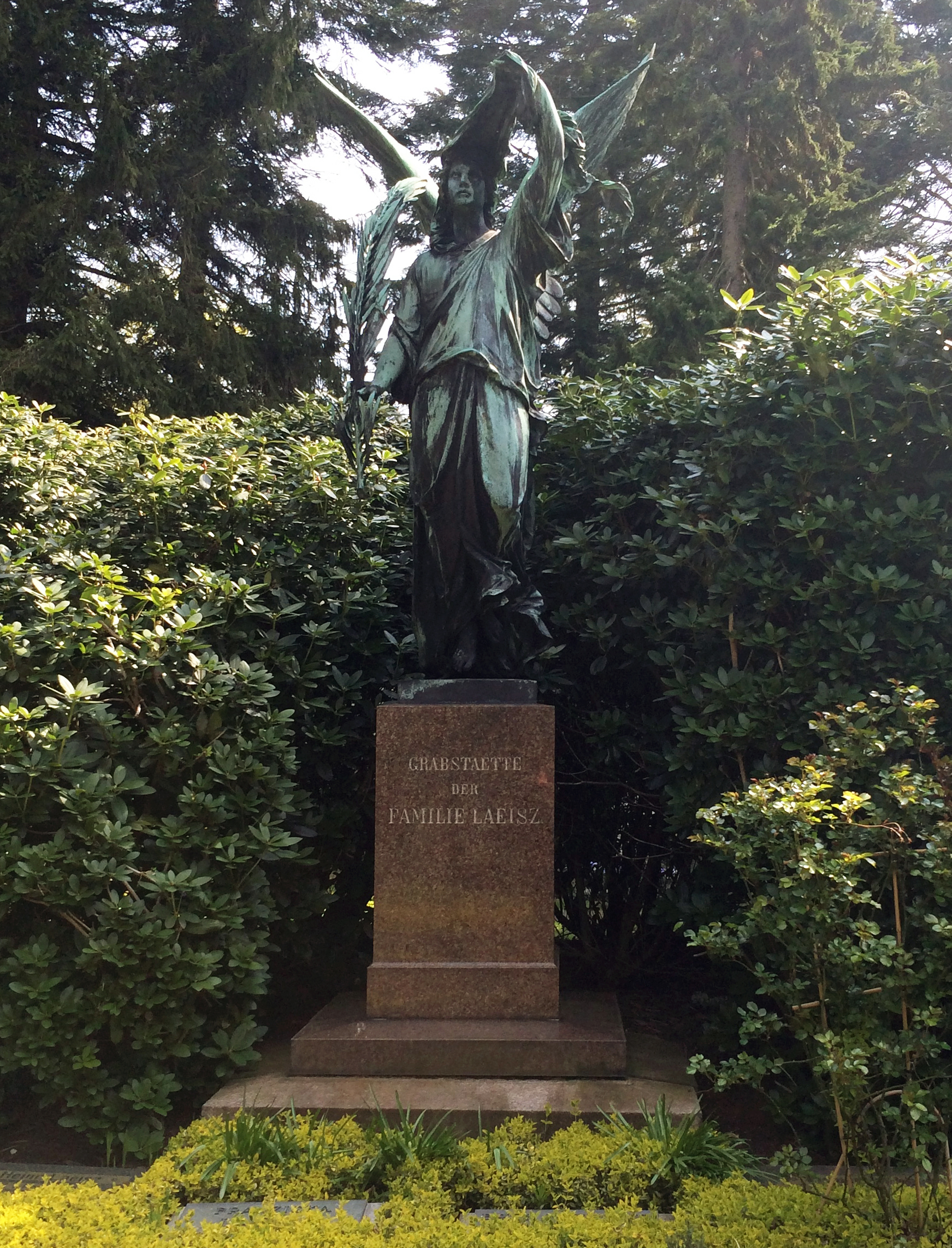 Familiengrab Laeisz. Das Grabmal befindet sich in der weitläufigen Anlage der Familien Meerwein, Canel, Hanssen, Laeisz auf dem Hamburger Ohlsdorfer Friedhof.